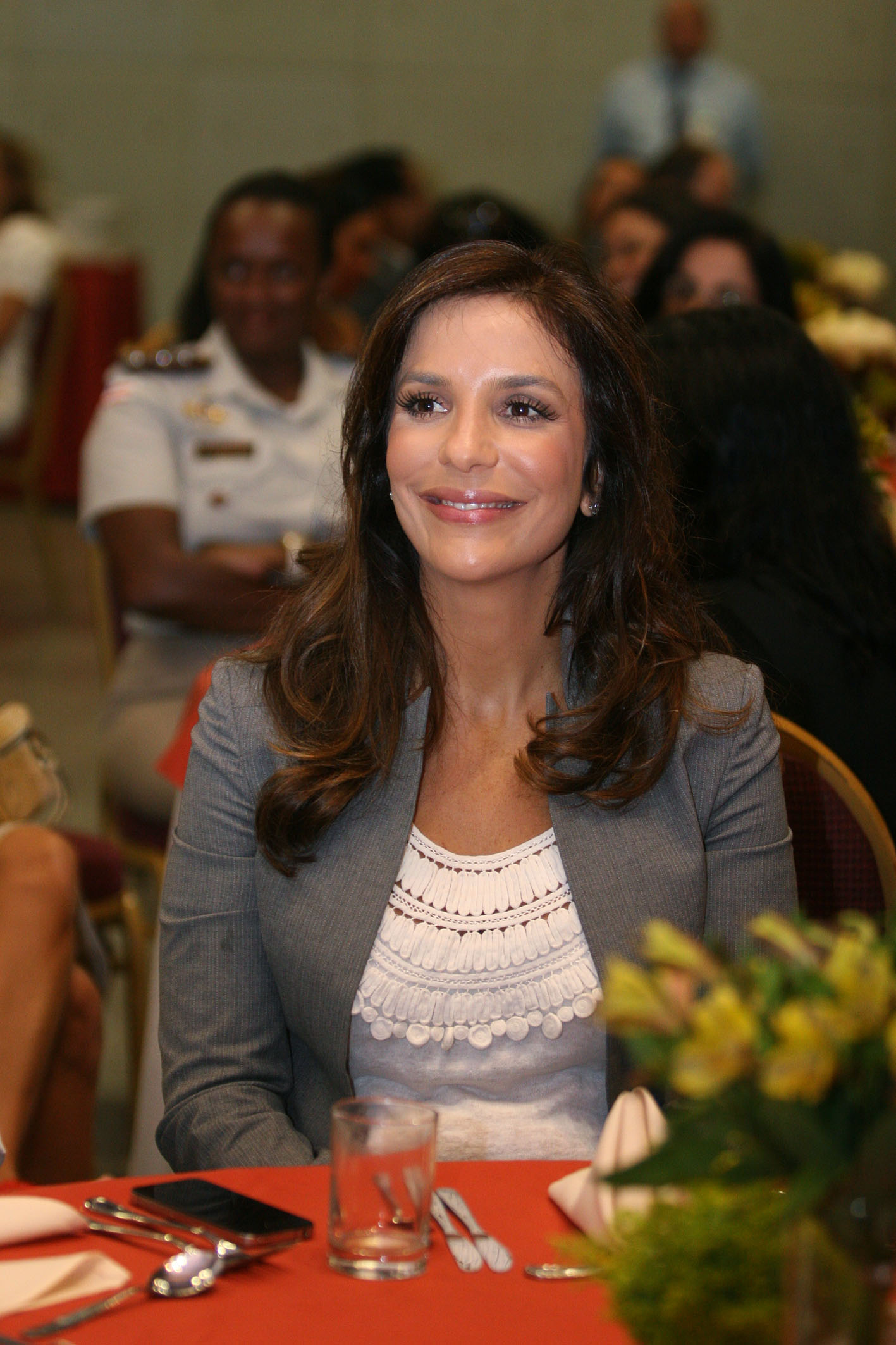 Academia da Polícia Civil homenageia as mulheres. Na foto: Ivete Sangalo.